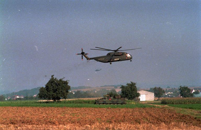 23.9.1986 Mitarbeiter des Bundespresseamtes beobachten das Herbstmanöver "Fränkischer Schild" der Bundeswehr- mit Beteiligung zahlreicher Soldaten aus NATO-Mitgliedsstaaten sowie eines französichen Großverbandes - im Raum Würzburg.